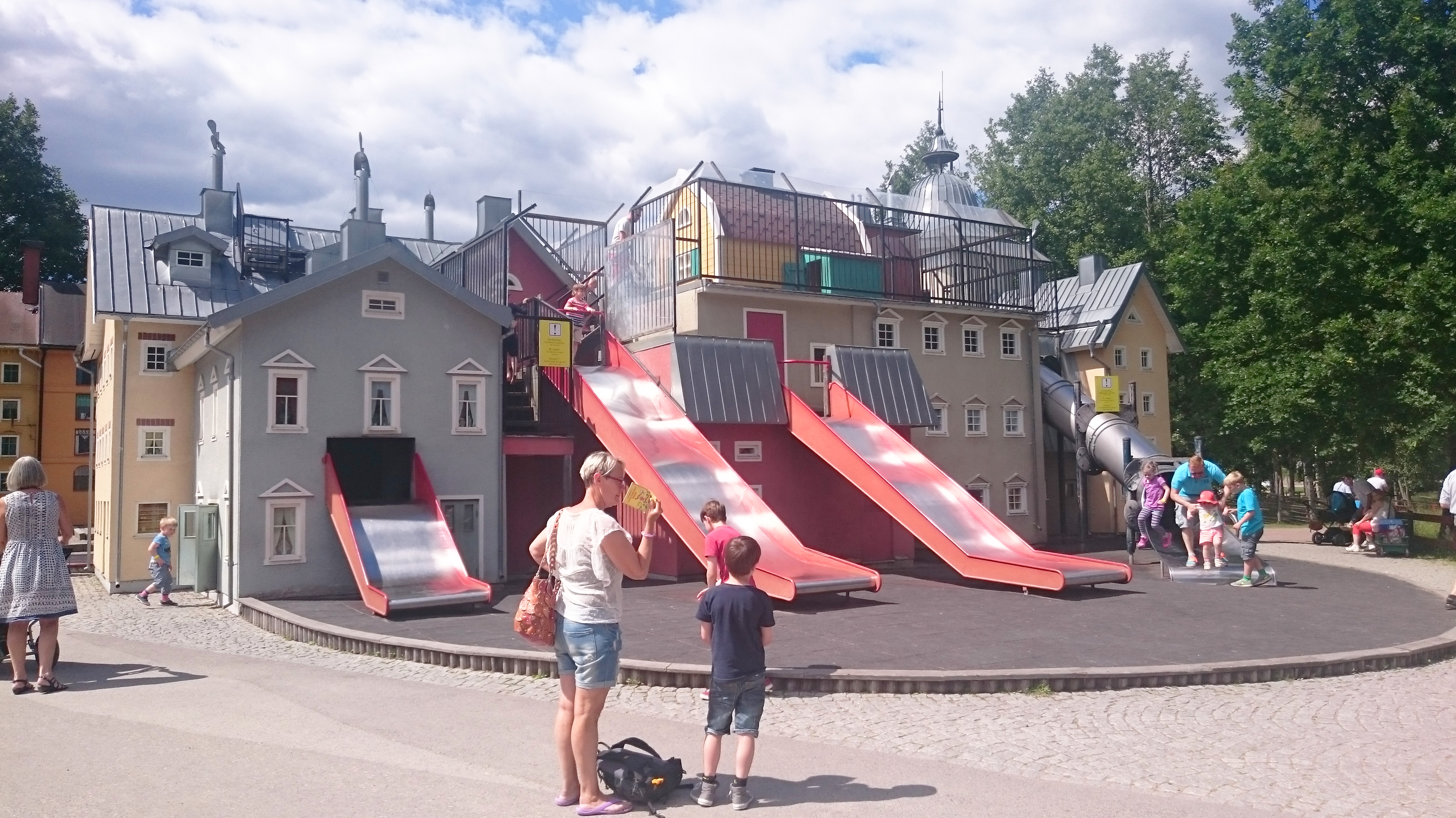 Rutschkanor vid Karlsson på takets område på Astrid Lindgrens värld.